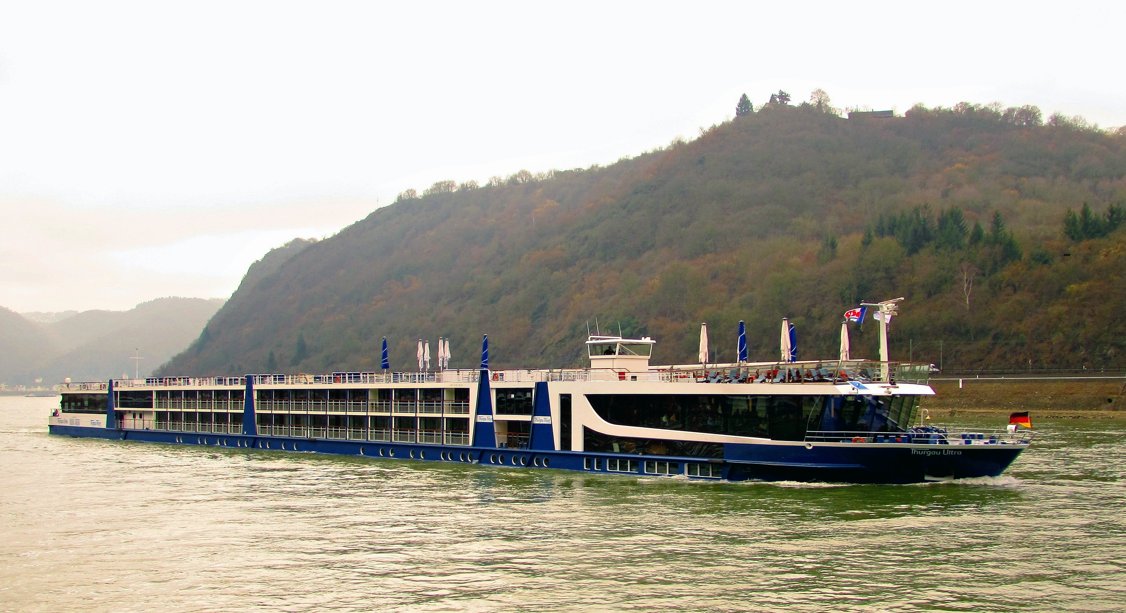 Kabinenfahrgstschiff Thurgau Ultra im Rheintal